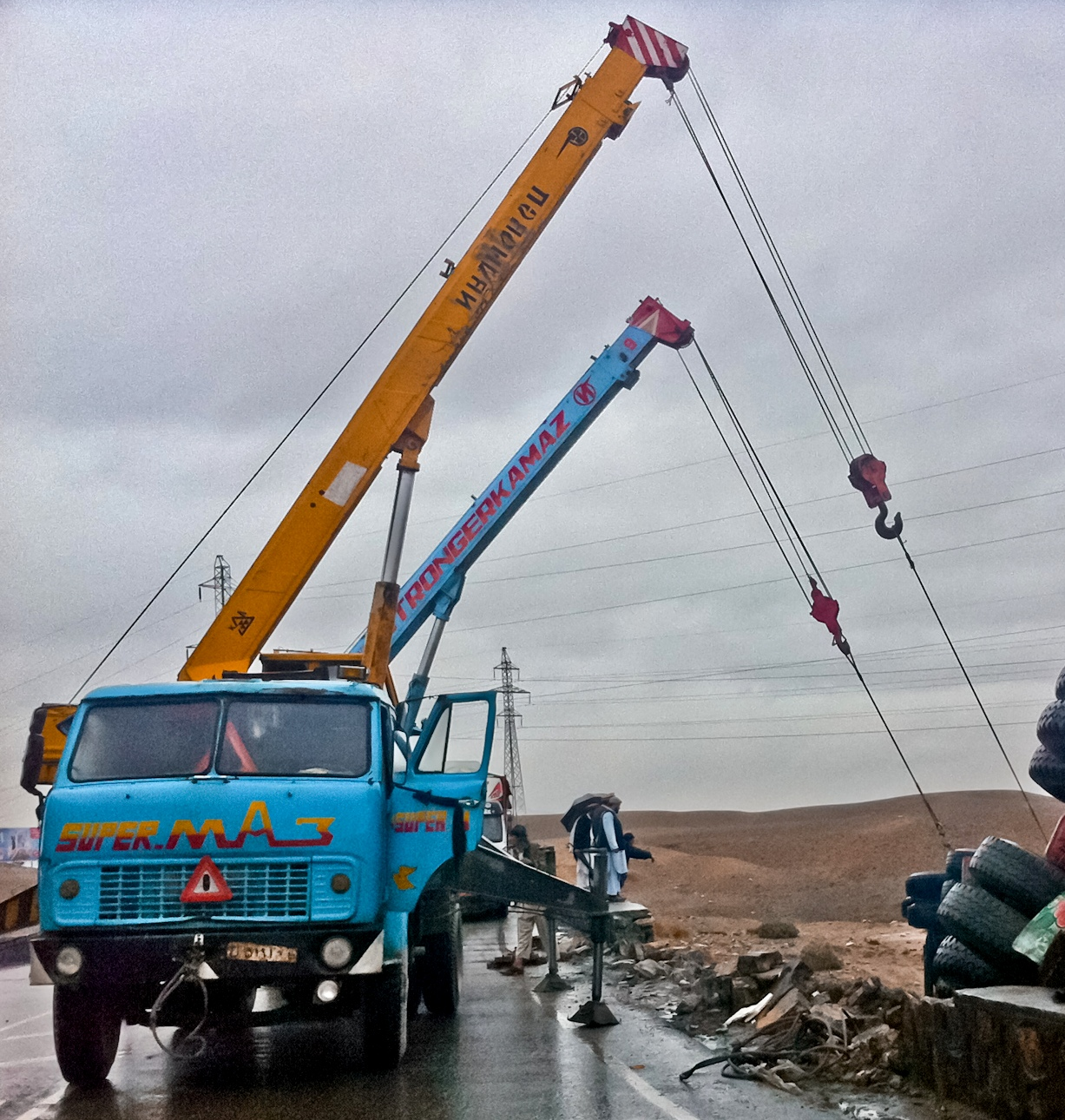 MAZ-5335 crane truck in Kabul, Afghanistan.